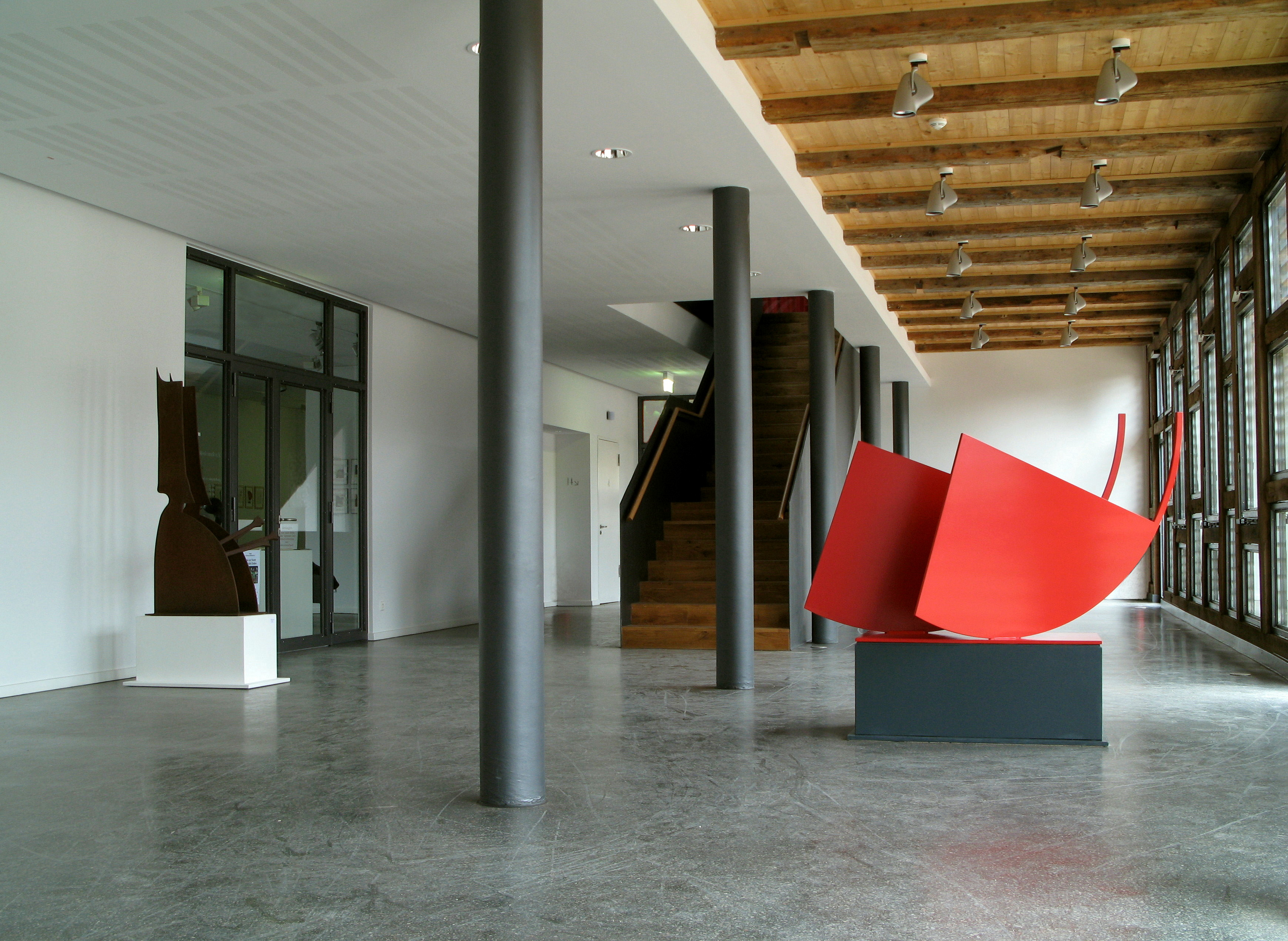 Ausstellungssituation im imago Kunstverein Wedemark mit Jürgen Friedes Stahlskulptur "Windobjekt", 2007, Stahl/roter Lack, 103x180x73cm.